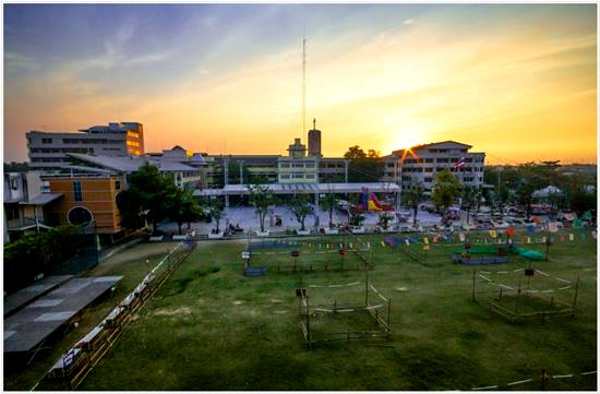 สภาพโรงเรียนสารสิทธิ์พิทยาลัย